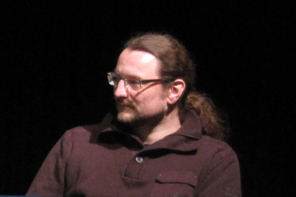 Tomáš Kočko